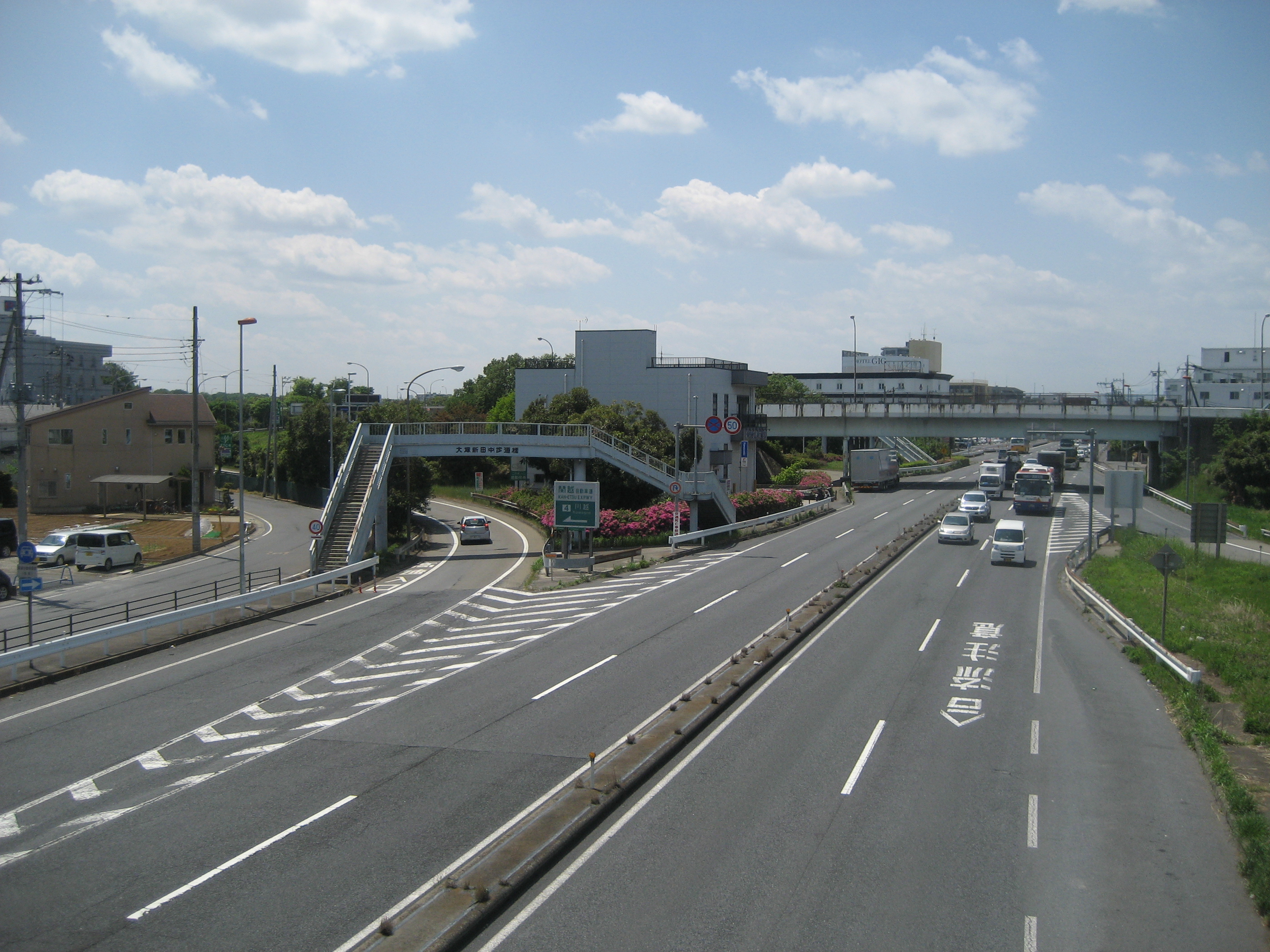 関越自動車道川越IC（川越市街側入り口付近）